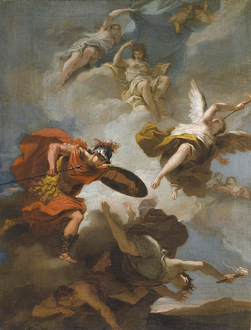 Scena allegorica con Marte e la Fama, collezione privata